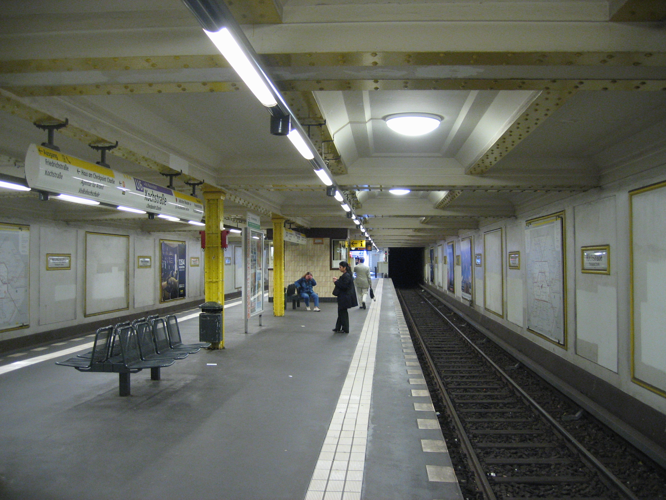 U-Bahnhof Kochstraße, Berlin